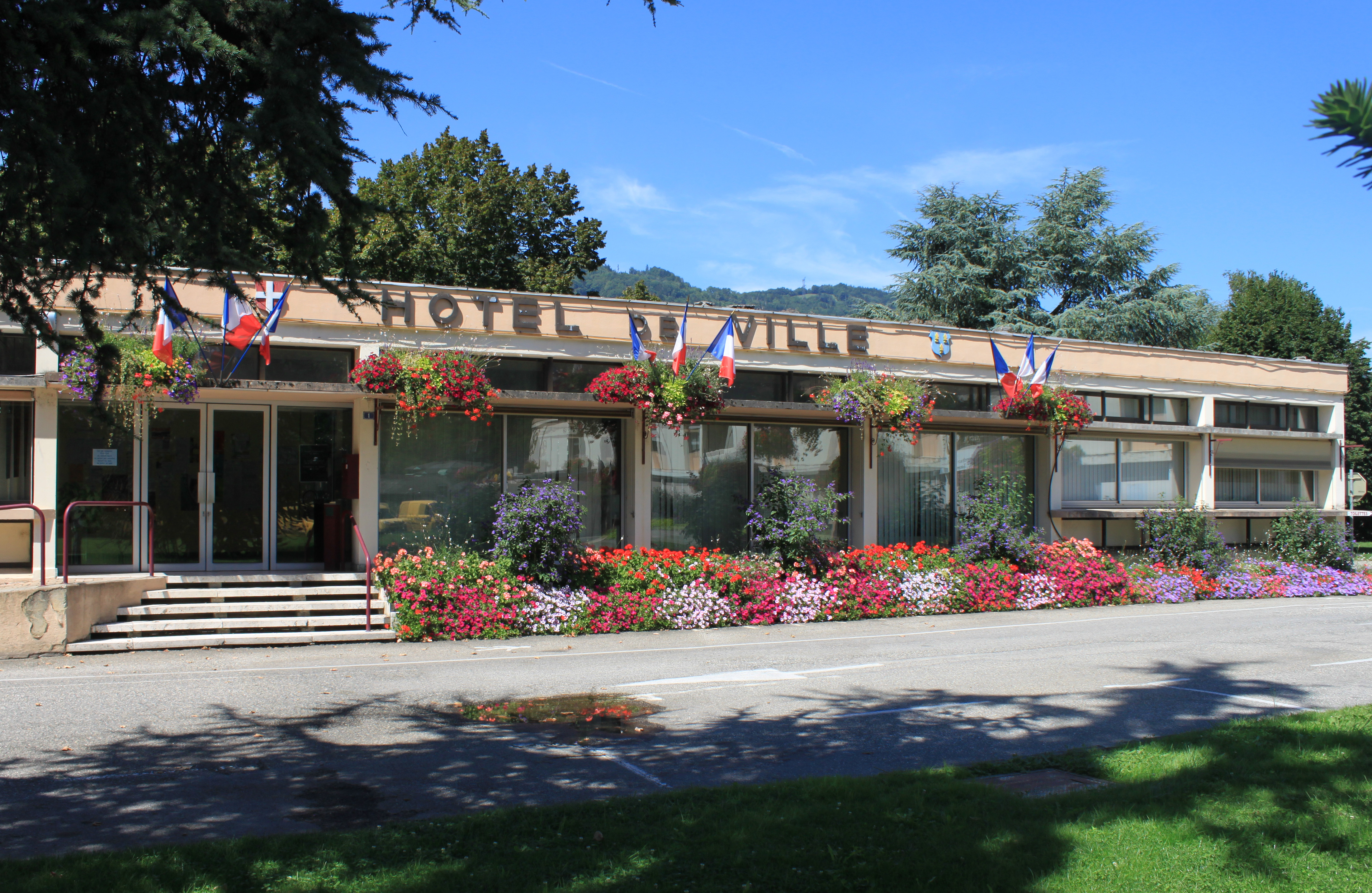 Marie de La Rochette (Savoie)